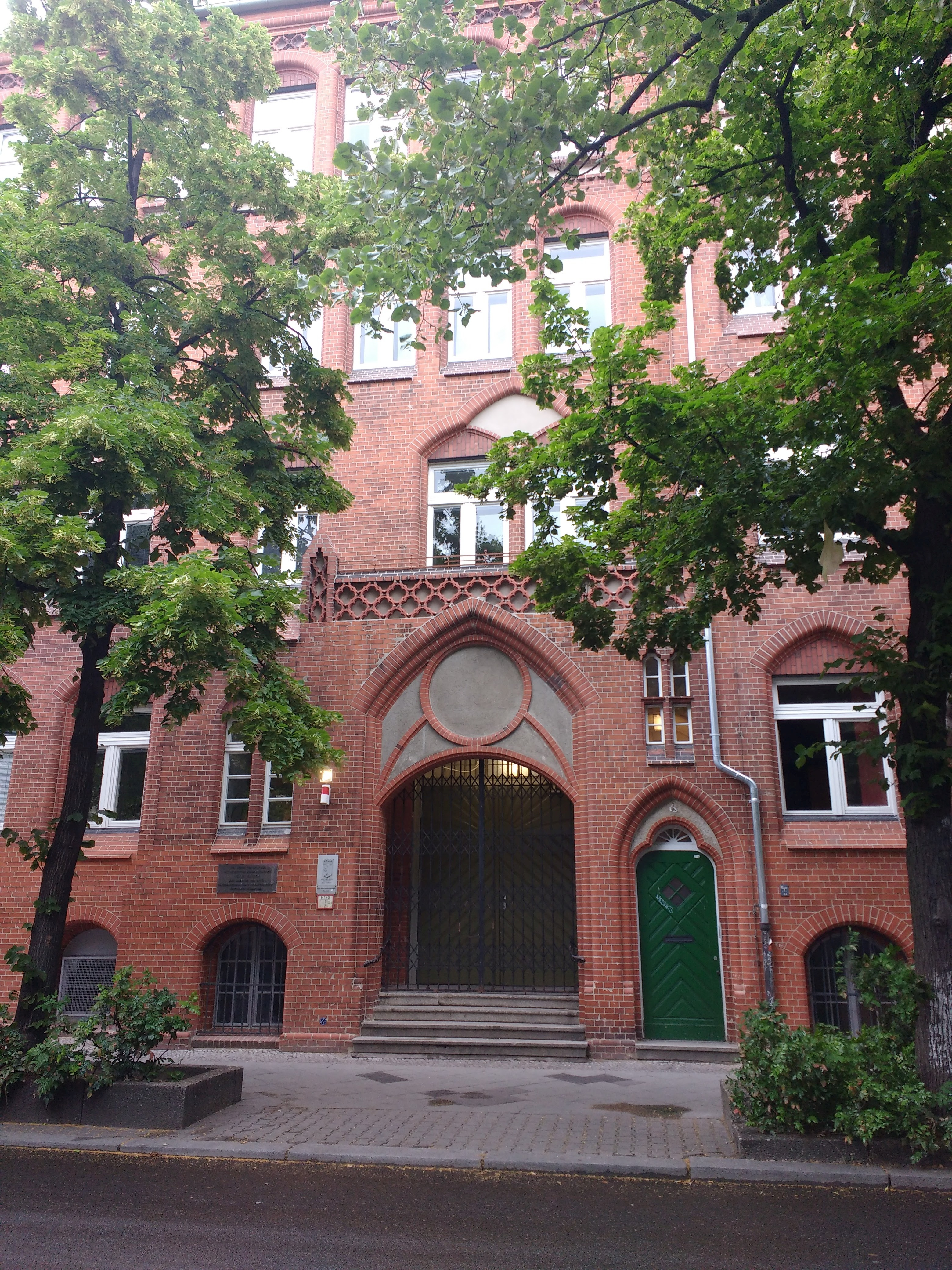 Eingang des Ernst-Abbe-Gymnasiums, der früheren Karl-Marx-Schule, in der Sonnenallee 79, Berlin-Neukölln. Links neben dem Eingang befindet sich die Gedenktafel für Fritz Karsen. Koordinate:52°29′0″N 13°26′13″E / 52.483333°N 13.43694°E